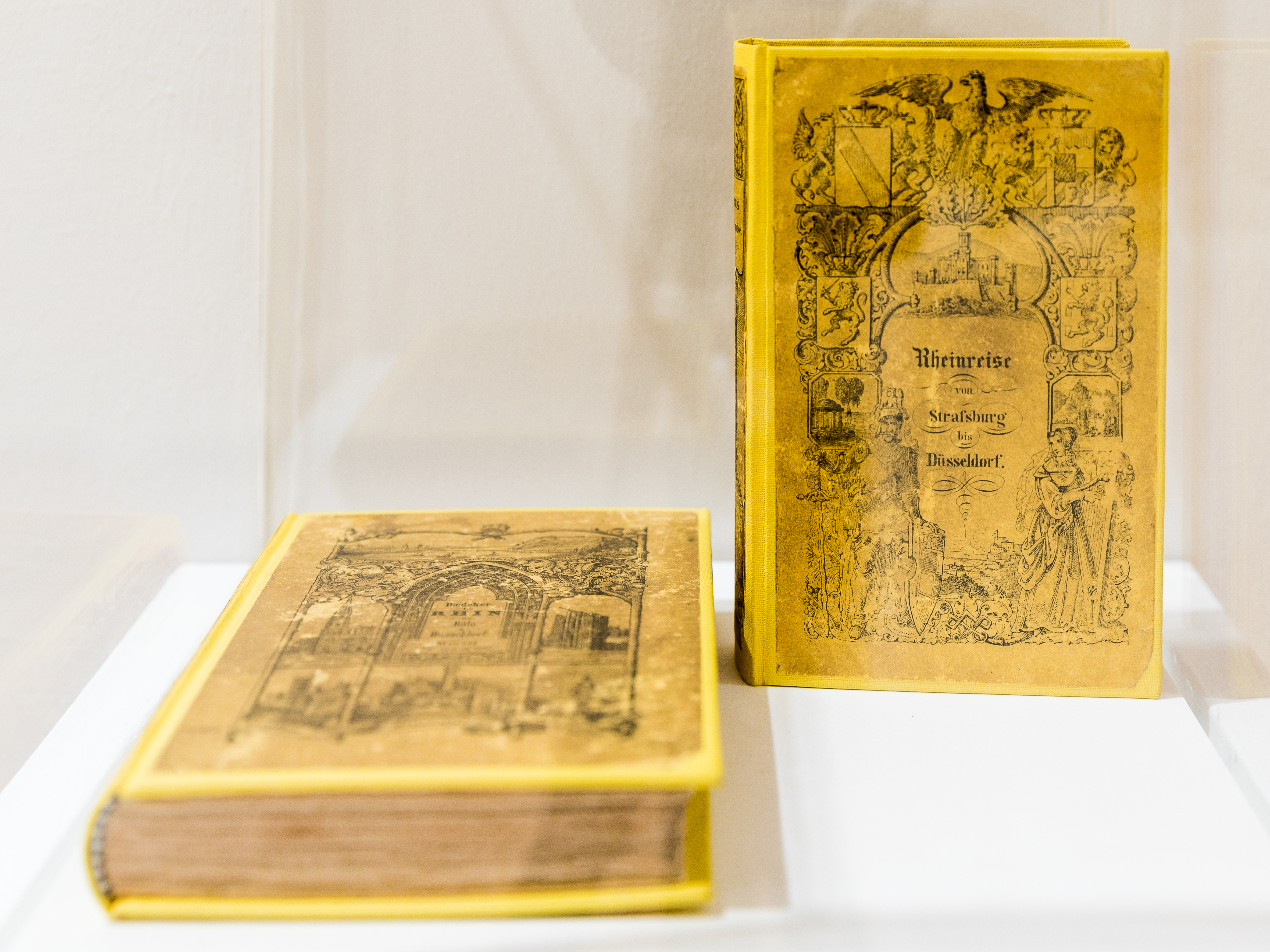 Bretter, die die Welt bedeuten. Spielend durch 2000 Jahre Köln Foto rechts stehend: „Rheinreise von Straßburg bis Düsseldorf mit Ausflügen nach Baden [...]“. Carl Baedeker und Johann Adolph Lasinsky (Herausgeber), Johann Baptist Augustin Klein (Verfasser). Koblenz, 1839. Leineneinband mit Originalpapierbezug, Papier, Druck, Lithografie Foto links liegend: „Le Rhine de Bâle à Dusseldorf et excursions en Alsace [...]“ (Rheinreise von Basel bis Düsseldorf). Carl Baedeker und Johann Adolph Lasinsky (Herausgeber). Koblenz, 1854. Leineneinband mit Originalpapierbezug, Papier, Druck, Lithografie. Beide Bestand Kölnisches Stadtmuseum